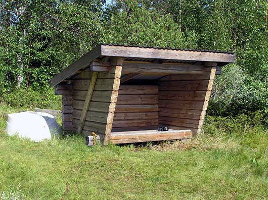 Från mina egna bilder. Fotograf: Tommy Halvarsson